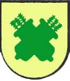 Herb wsi Krzeszów (gmina Stryszawa)